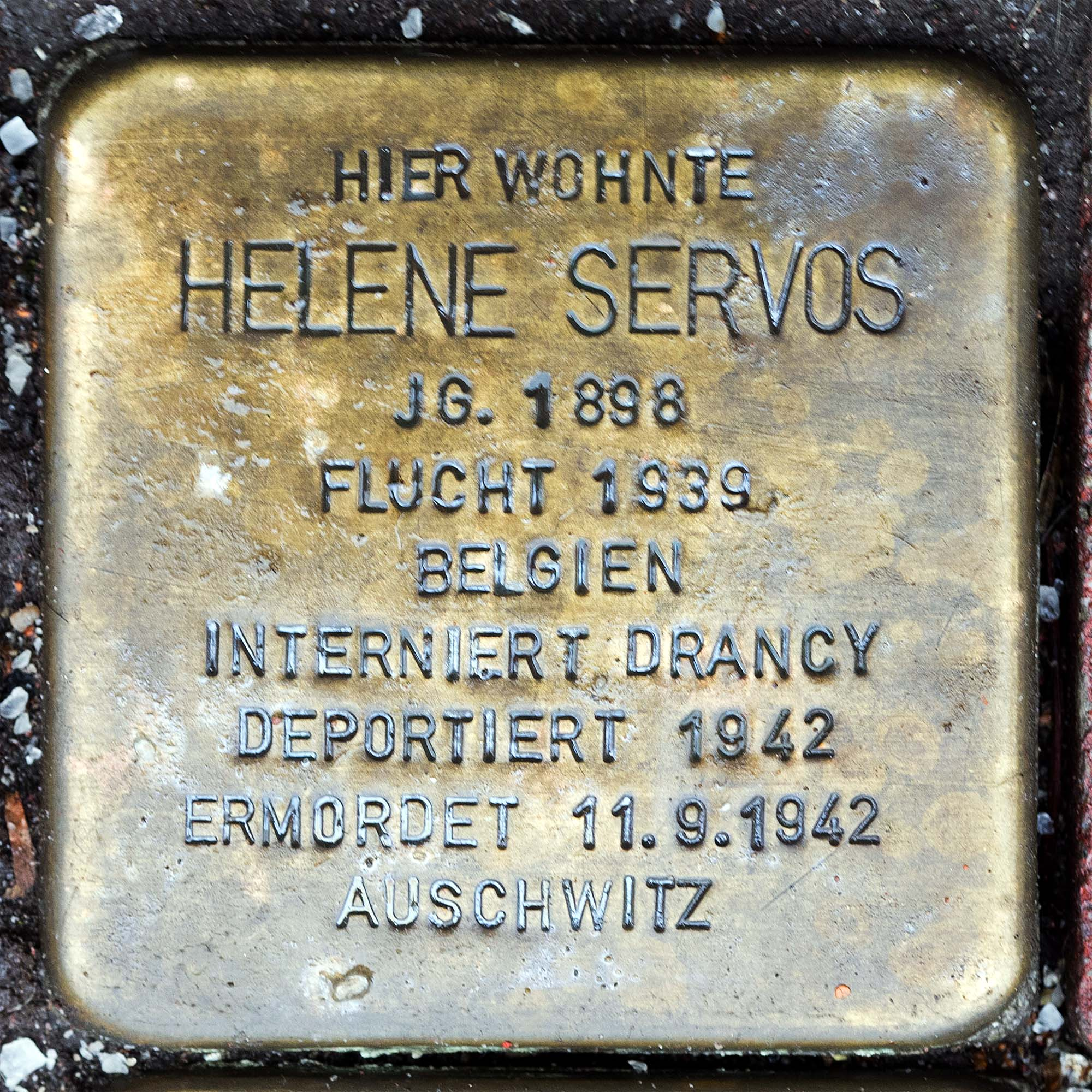 Stolperstein für Servos Helene